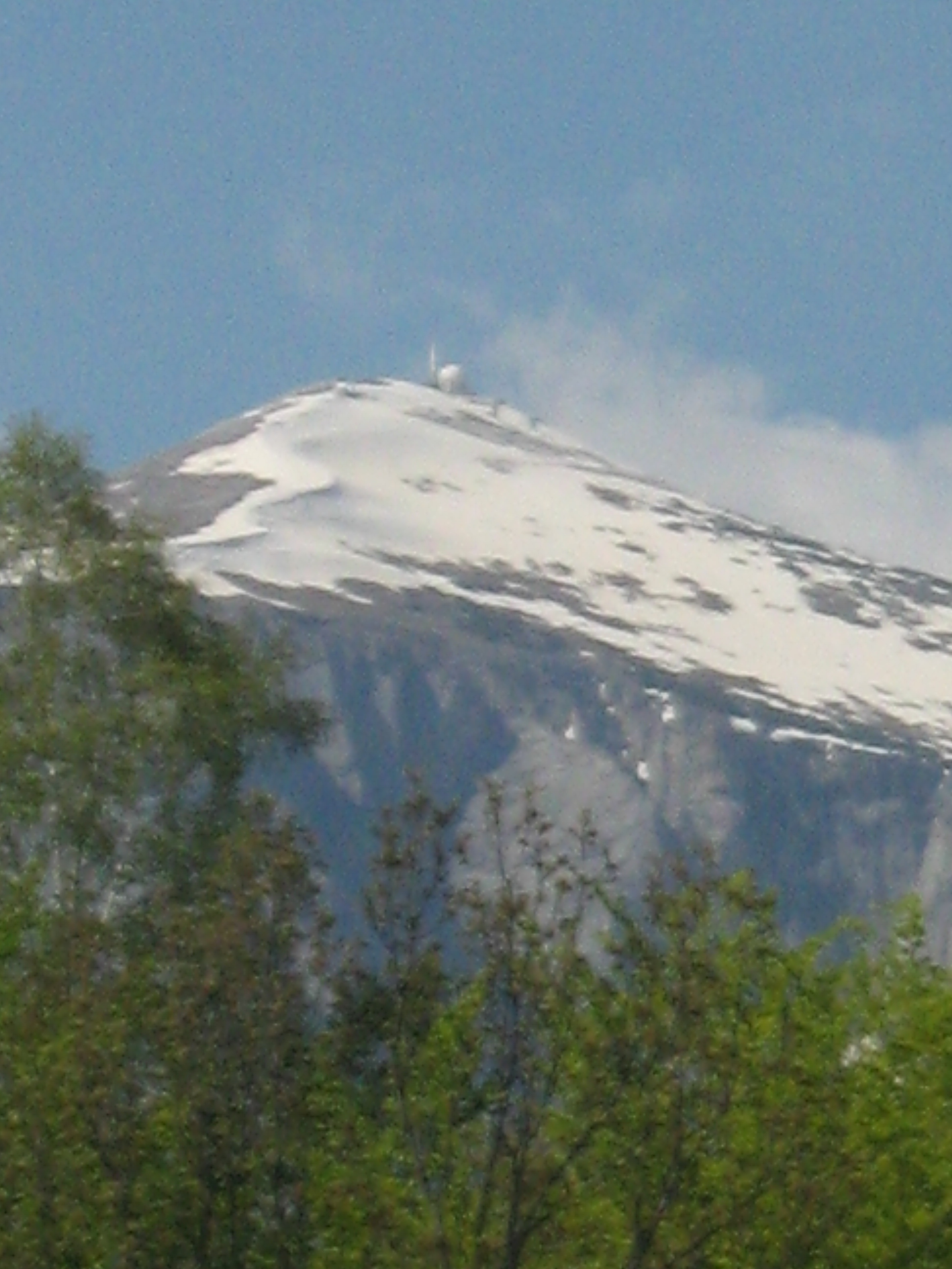 Поглед кон планинскиот врв Солунска Глава на планината Јакупица во Македонија, од позиција над селото Папрадиште.